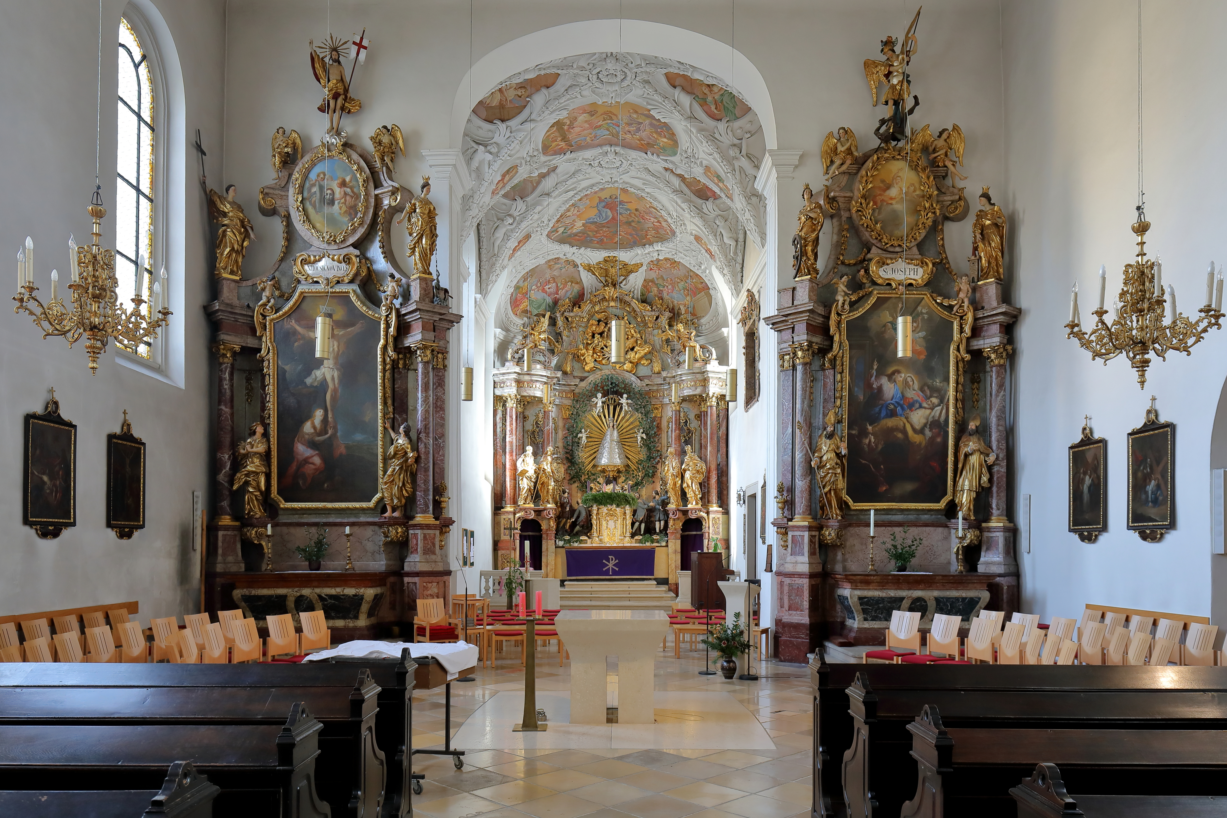 Innenansicht der röm.-kath. Pfarr- und Wallfahrtskirche Maria Hietzing im 13. Wiener Bezirk Hietzing. Der monumentale Hochaltar wurde 1698 von Matthias Steinl errichtet. Die zwei Seitenaltäre wurden ebenfalls von ihm entworfen.